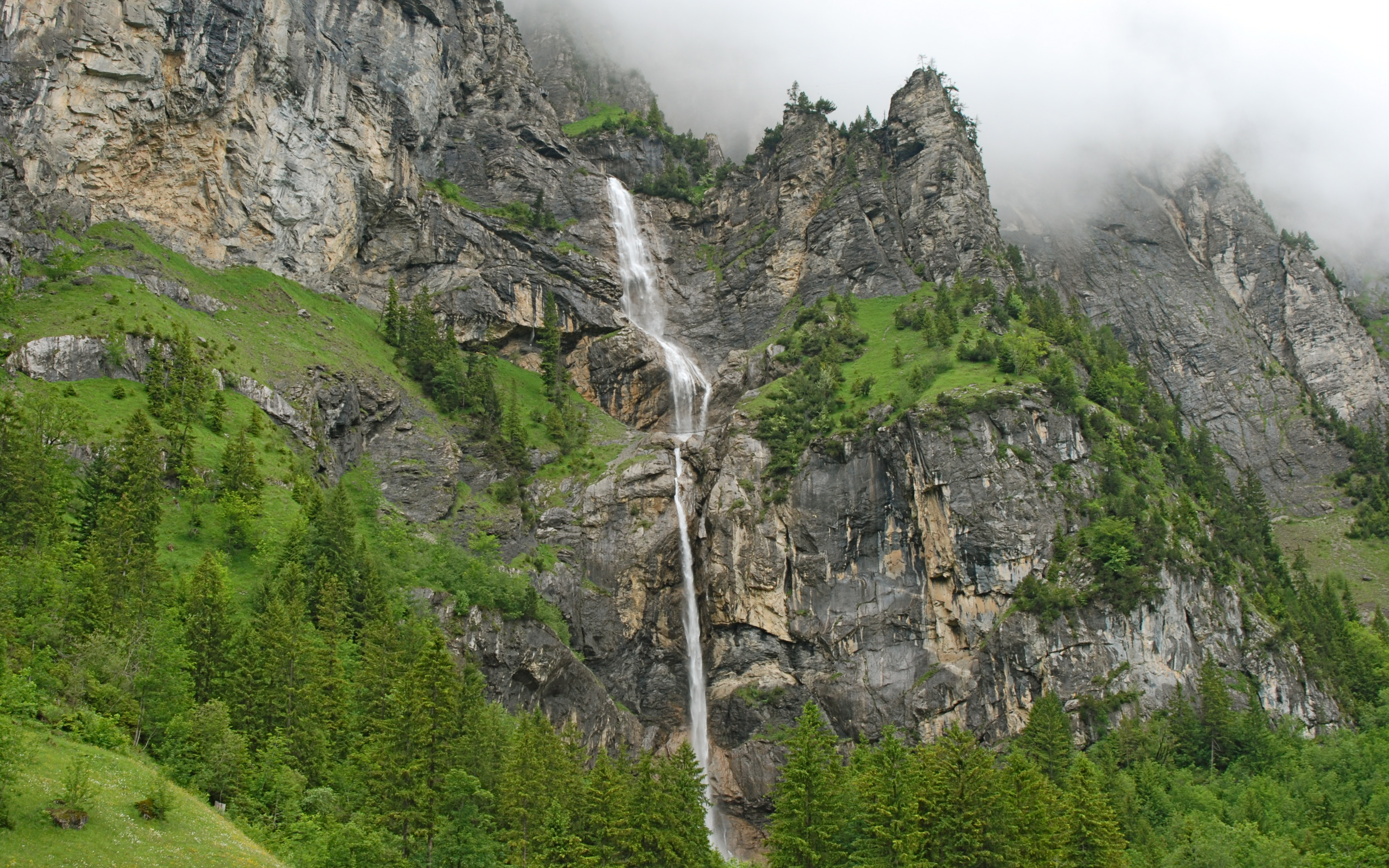 Almenalp Klettersteig